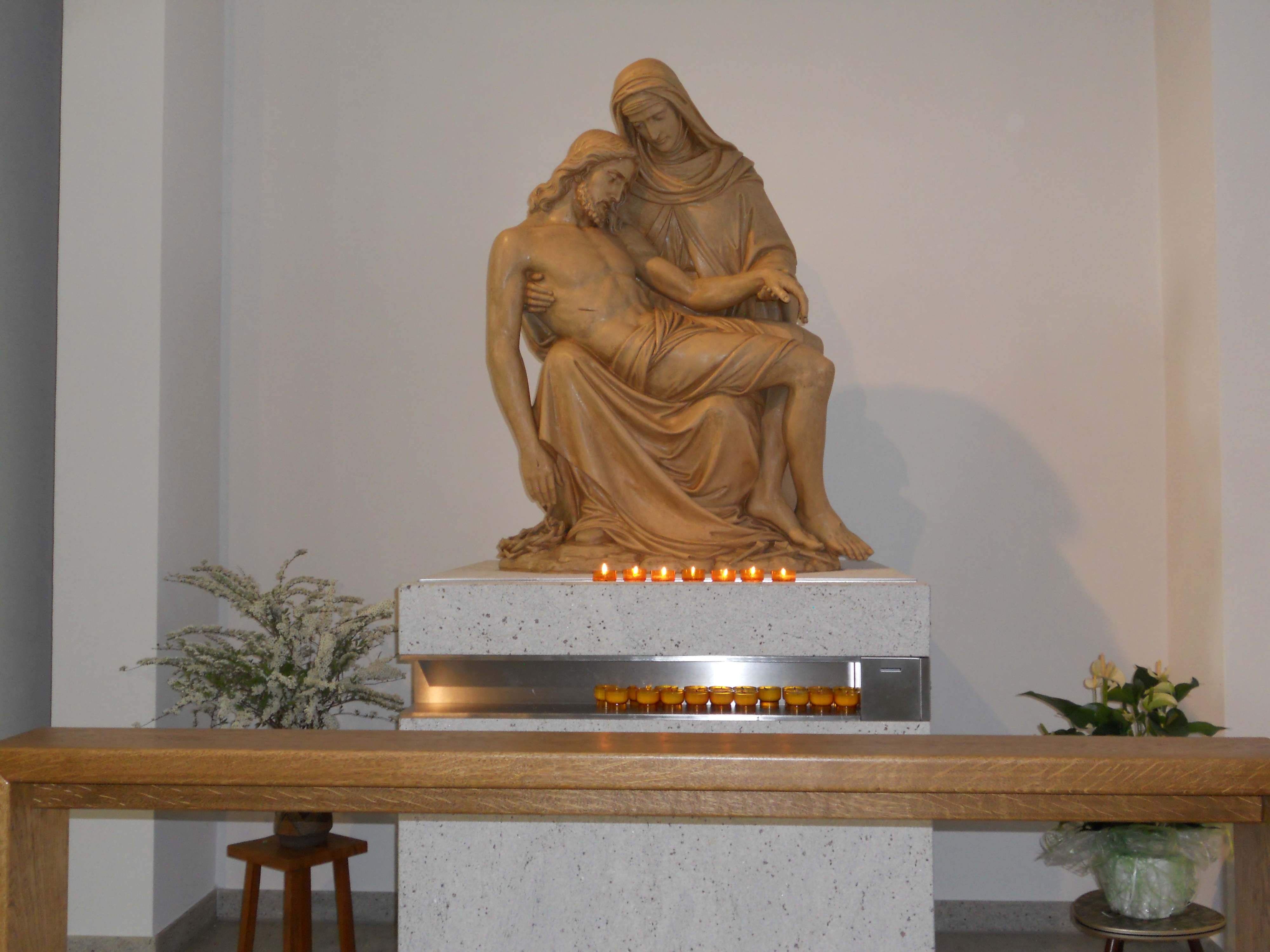 Pieta in der Gebetskapelle in St. Peter Werl